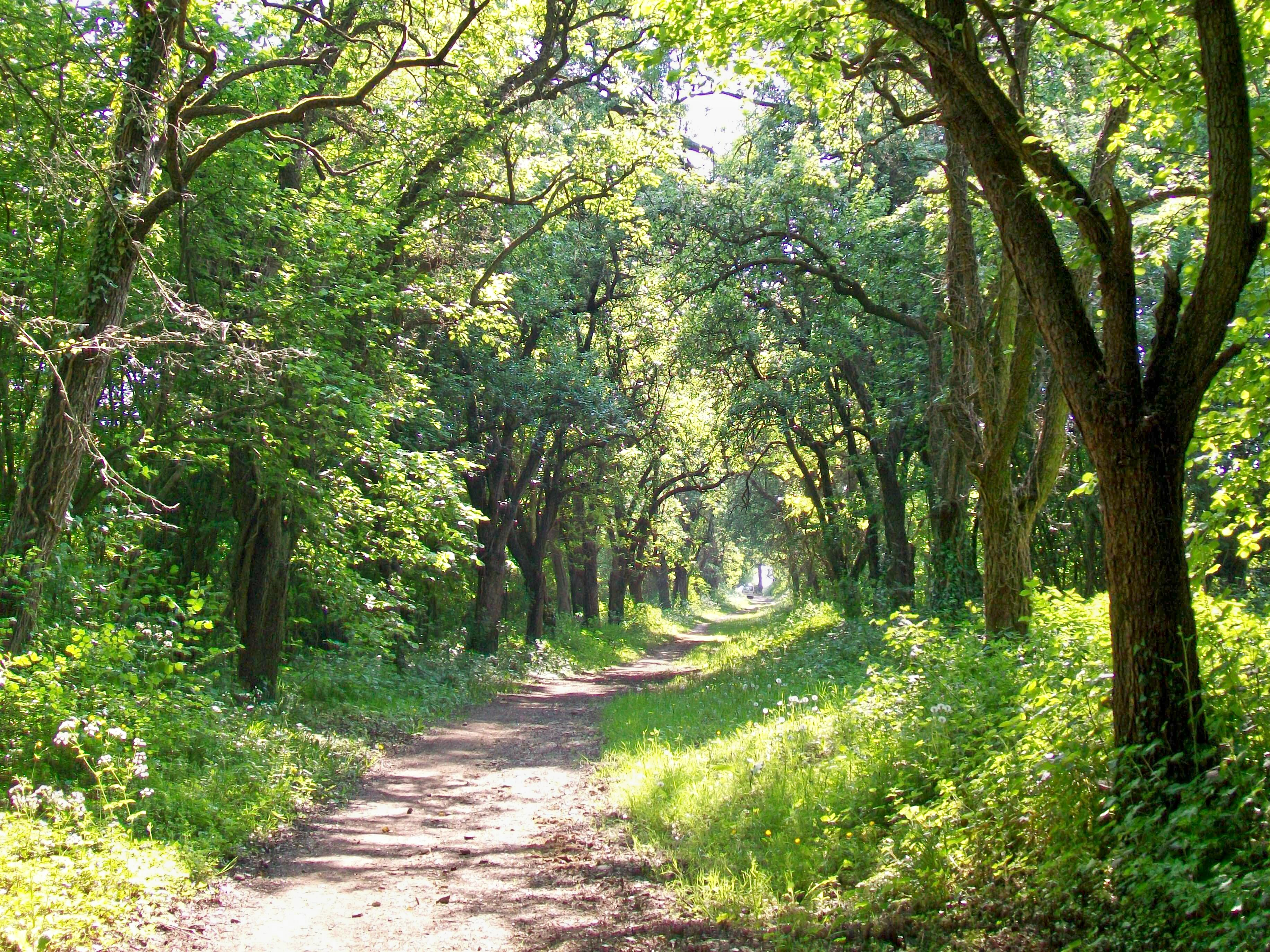 Le chemin rural n° 42 dit de Fontaine-Chaalis, qui est l'ancien tracé de la D 126 où cette route comporte aujourd'hui un lacet pour gravir plus facilement la butte de Montmélian. Le chemin se termine devant les portes de Saint-Witz, au hameau de Plailly.